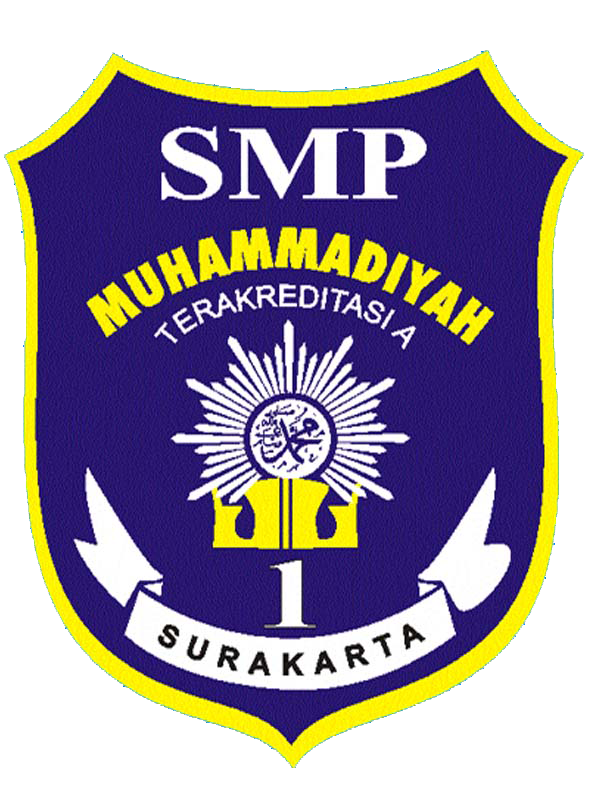 smp muhammadiyah 1 simpon surakarta